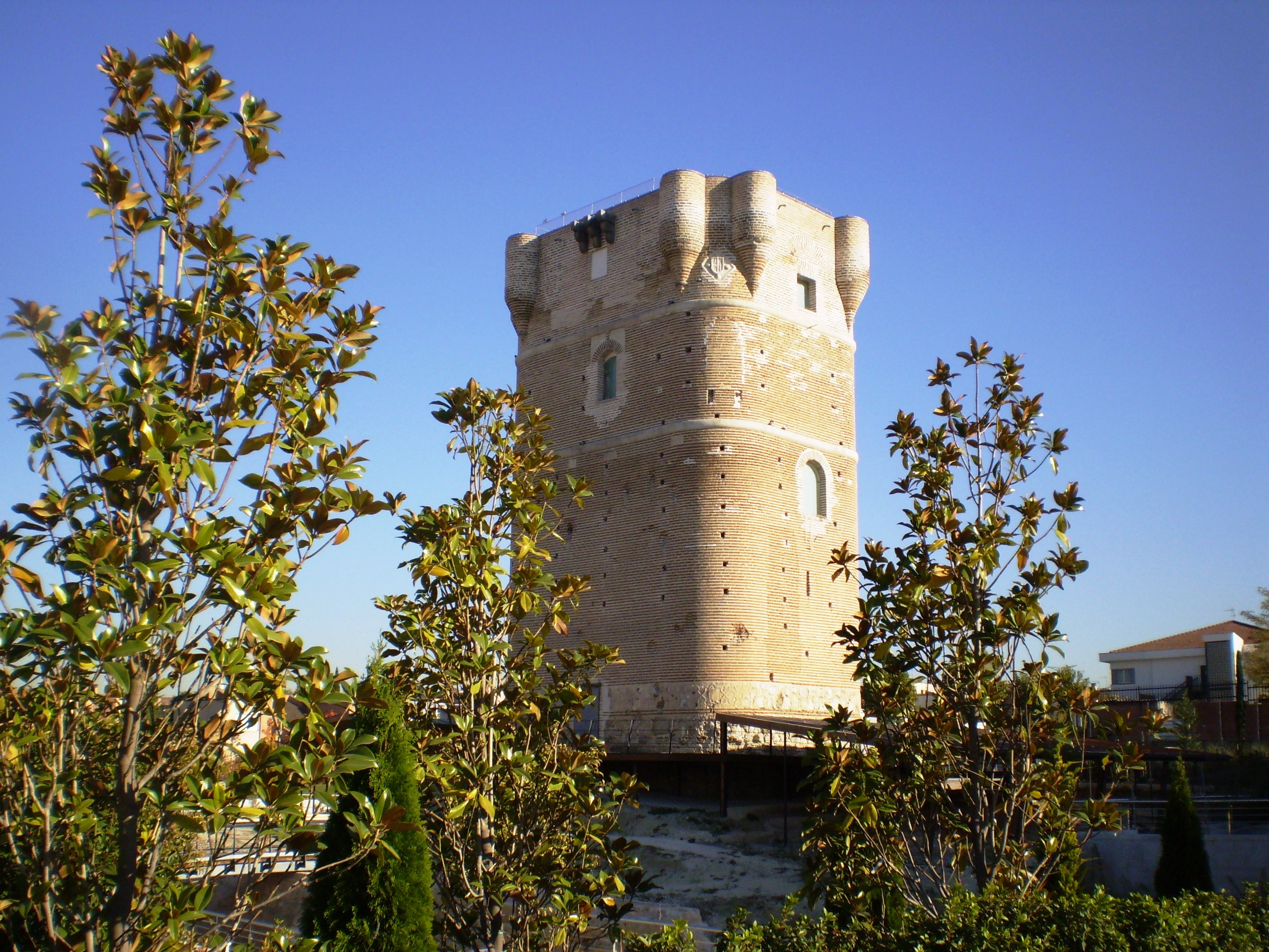 Torreón de Arroyomolinos, Madrid, Spain